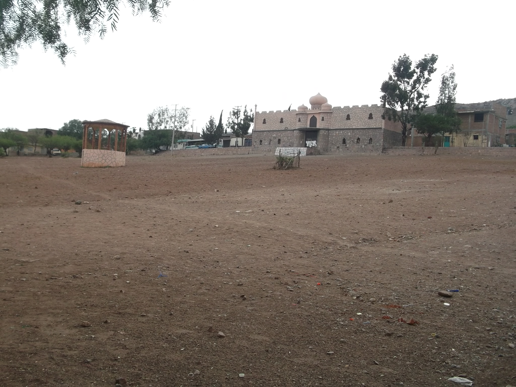 el campo